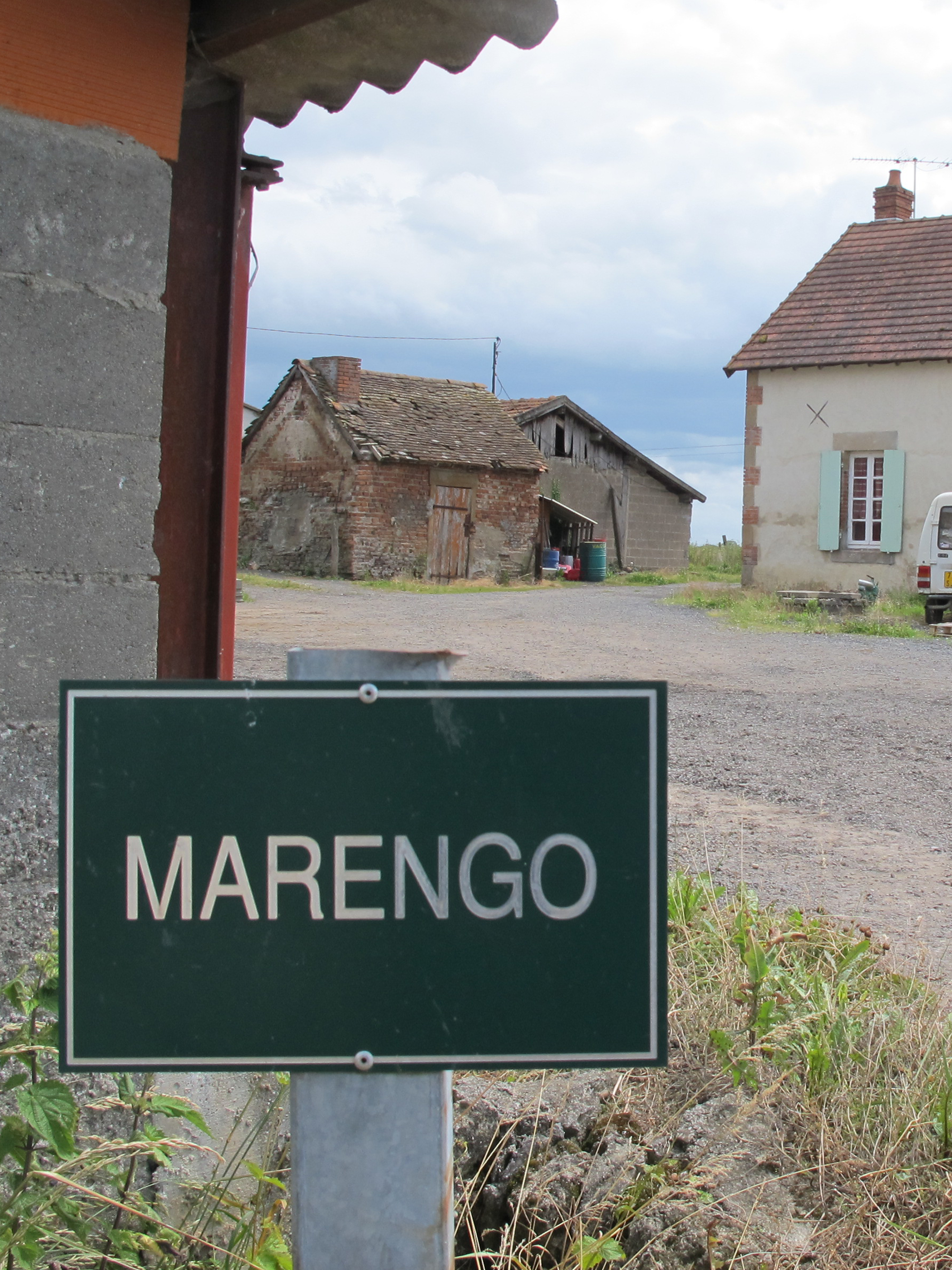 Cliché pris du chemin sur la ferme du lieu-dit de « Marengo » dans le département de l'Allier